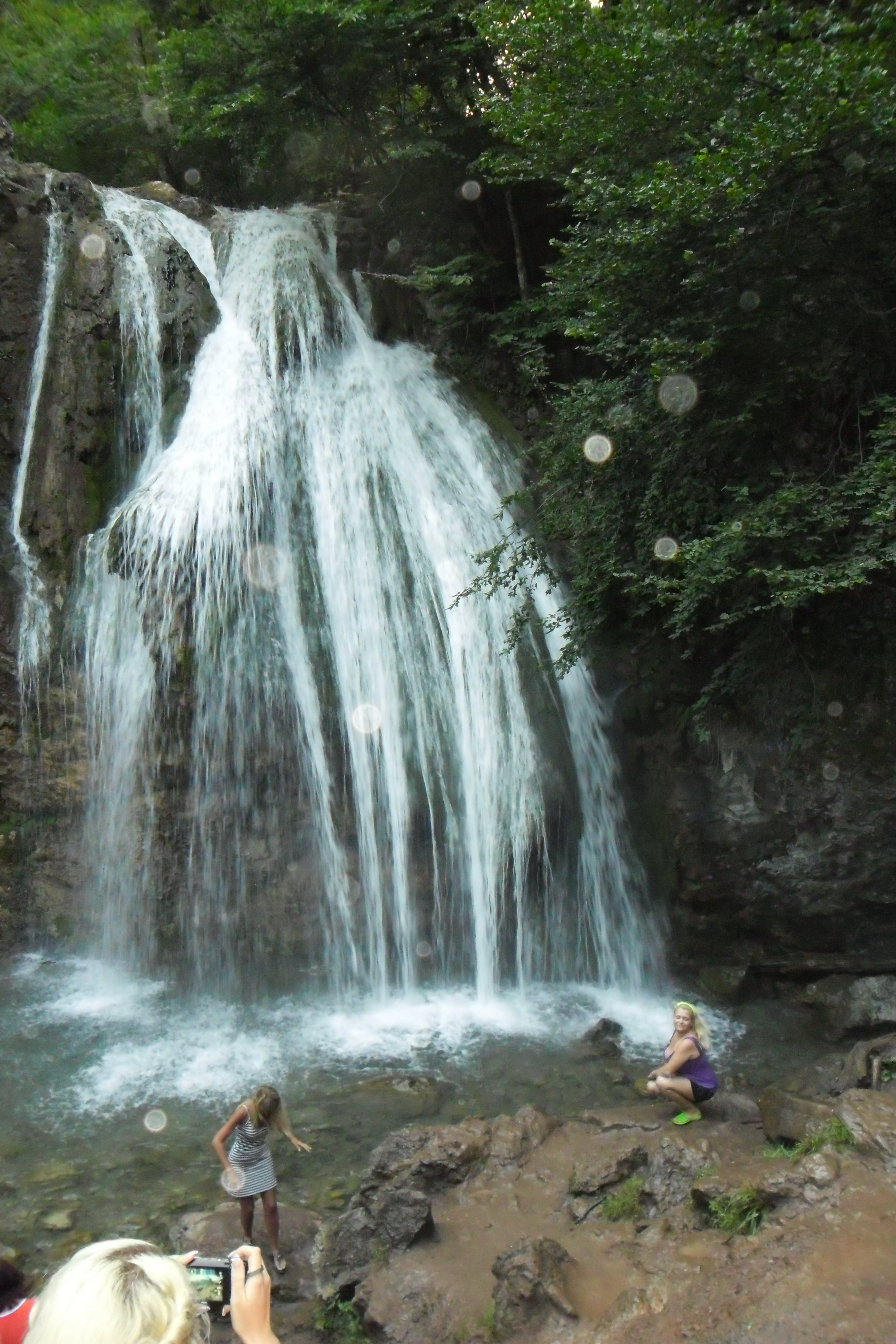 Фото